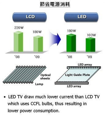 LCD TV 與 LED TV比較2